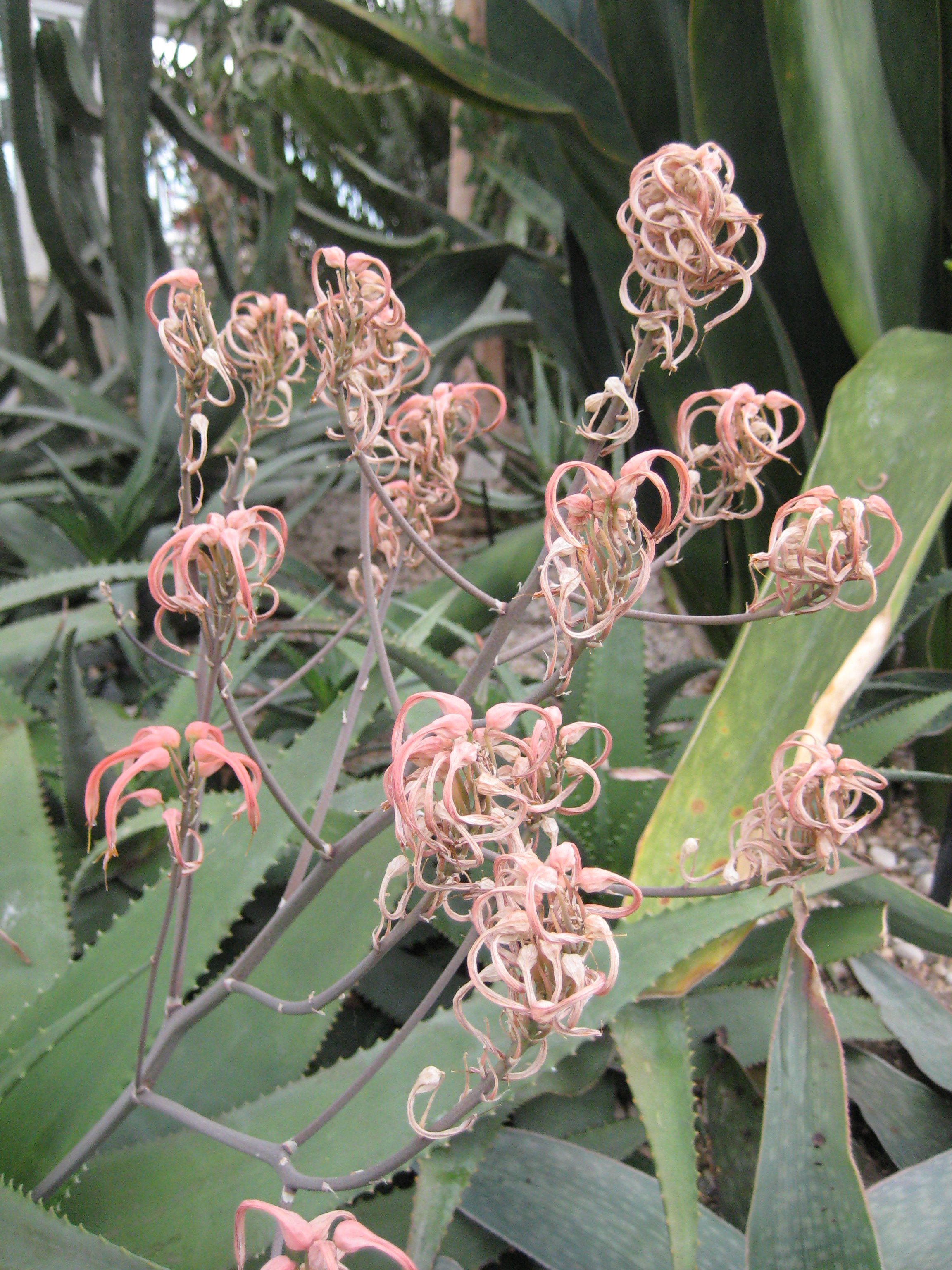 Aloe chabaudii var. Mlanjeana Aloeaceae Malawi (Mulanje Mts.)